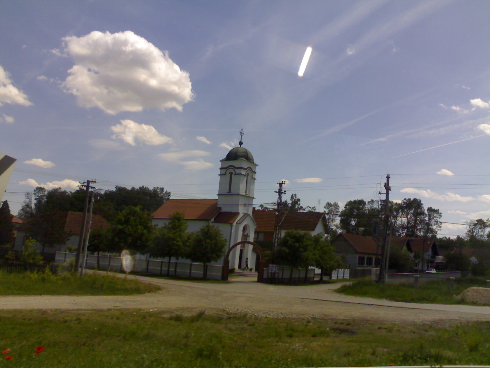 Село Слепчевић-Шабац, православна црква, сликано 6. 5. 2012. Licensing